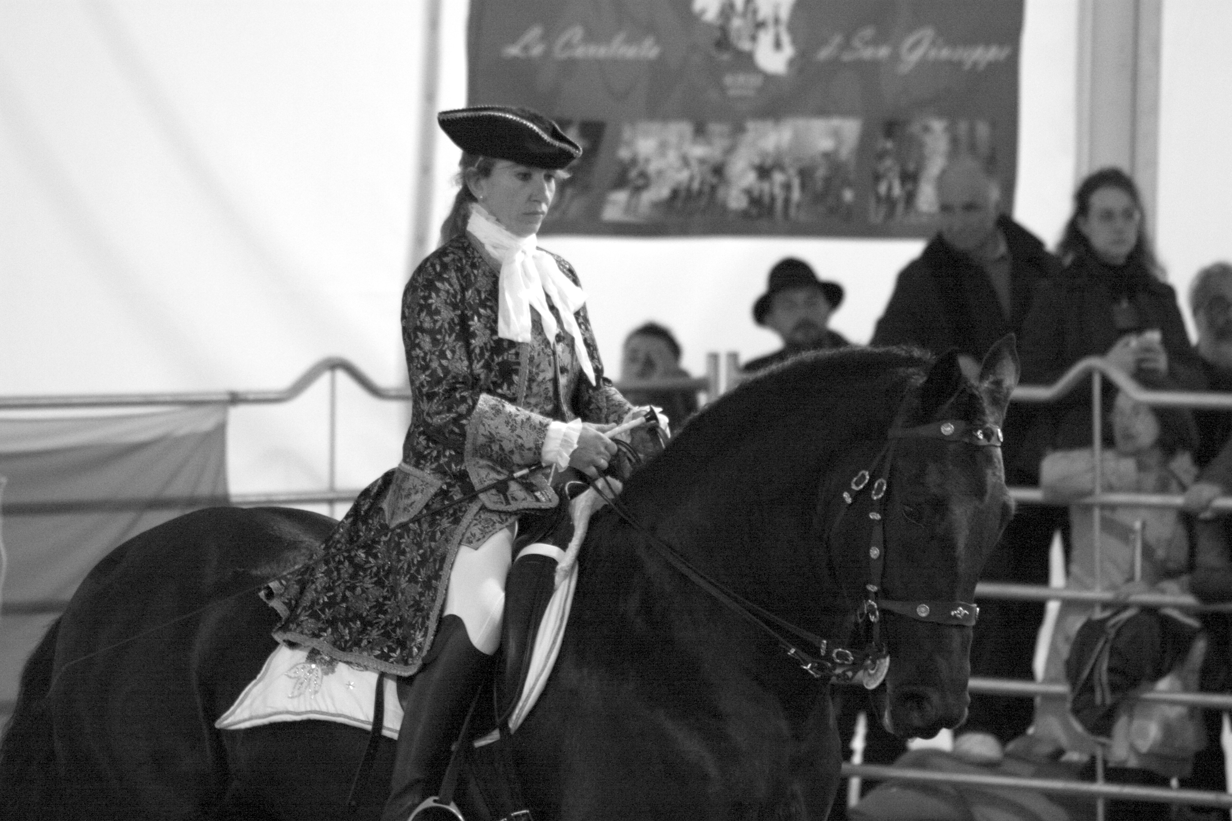 cavallo Murgese, TROIANO, Fieracavalli di Verona 2011, spettacolo in costume Federiciano